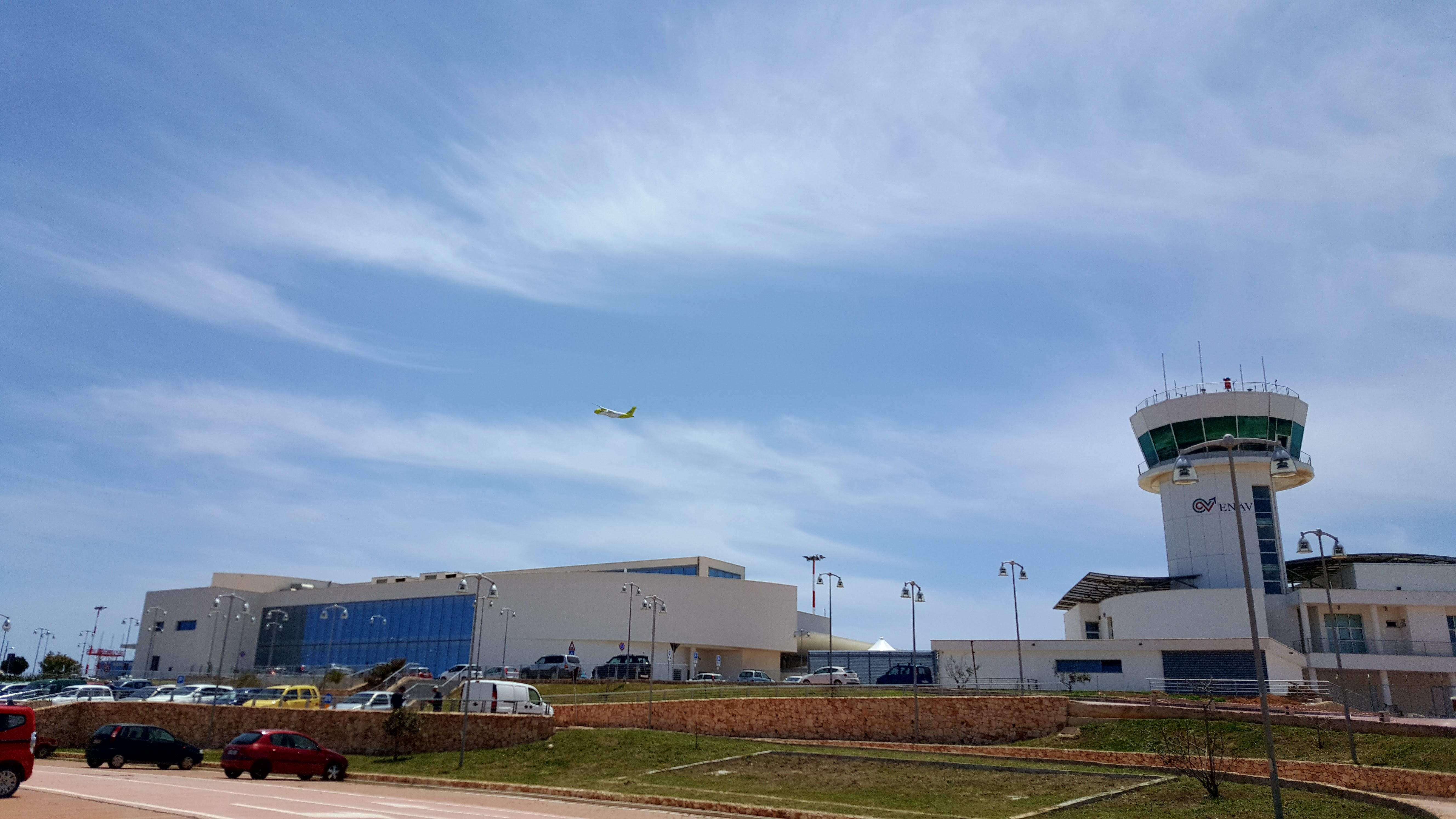 Aeroporto di Lampedusa. Ingresso e torre di controllo ENAV ristrutturati nel 2016.